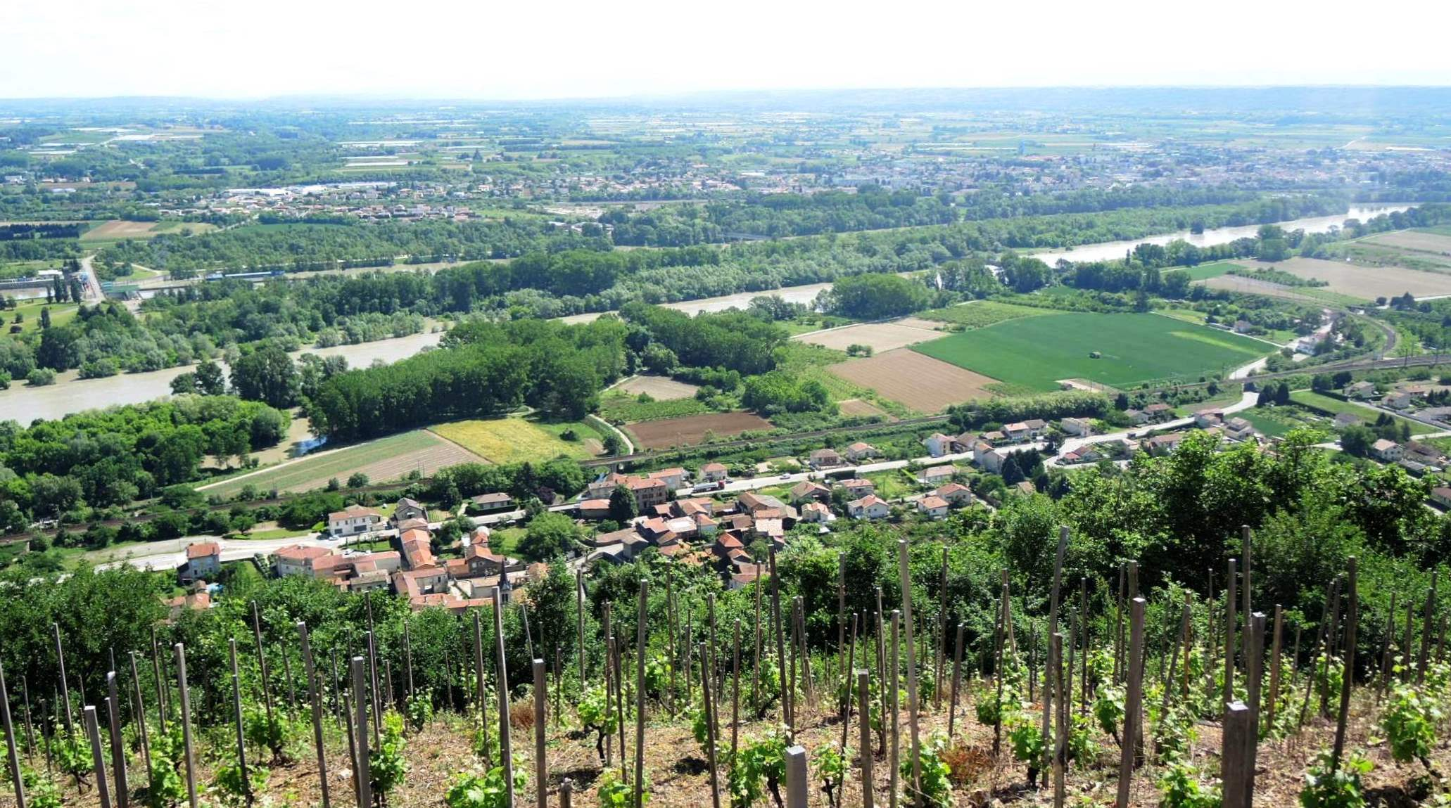 Peyraud détail